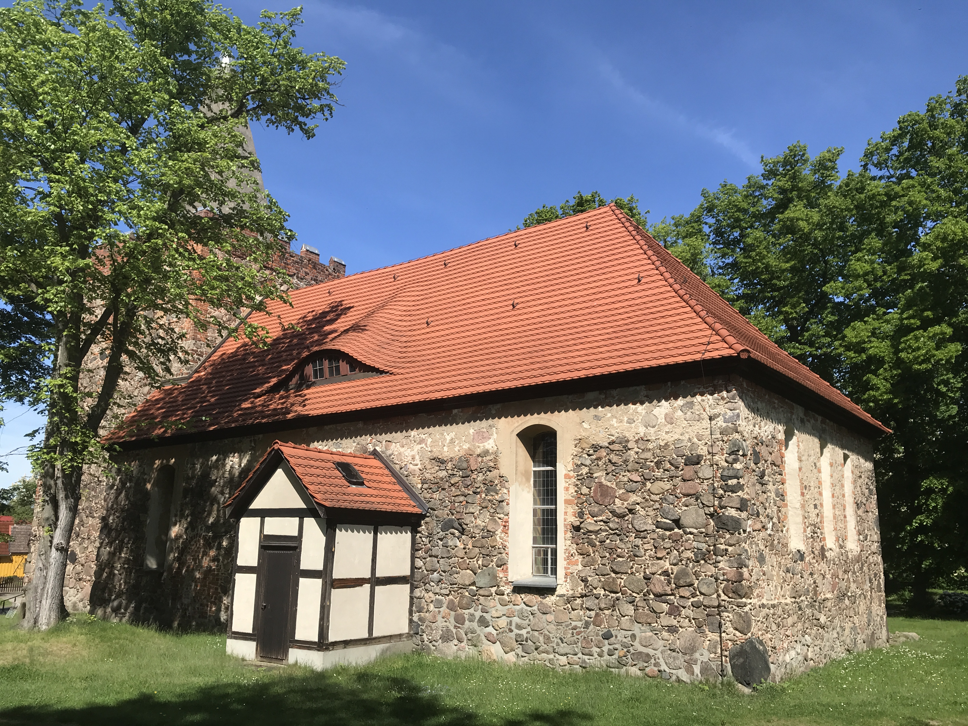 Die Dorfkirche in Rauen ist eine Feldsteinkirche aus dem 15. Jahrhundert im Landkreis Oder-Spree im Land Brandenburg